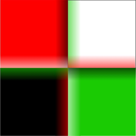 Quadrat, bestehend aus den Farben Rot, Weiß, Schwarz und Grün. Es verdeutlicht, wie der Simultankontrast in den Randbereichen auf unser Sehorgan wirkt - allerdings in stark übertriebener Form. Das Rot induziert in seiner Umgebung Grün. So erscheinen das Weiß am Rand hellgrün und das Schwarz dunkelgrün.